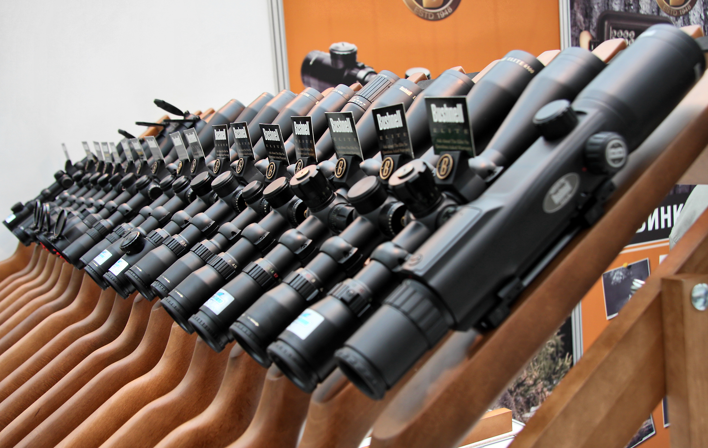 Оптические прицелы Bushnell (Bushnell optics)